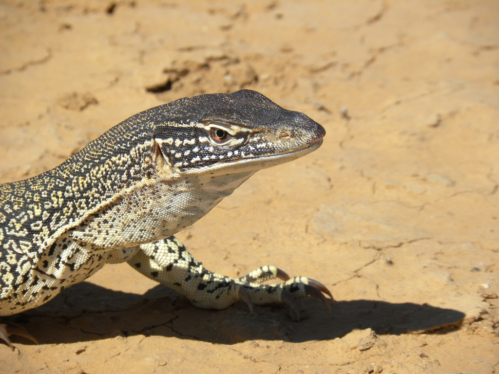 Varanus gouldii Sand Goanna Head